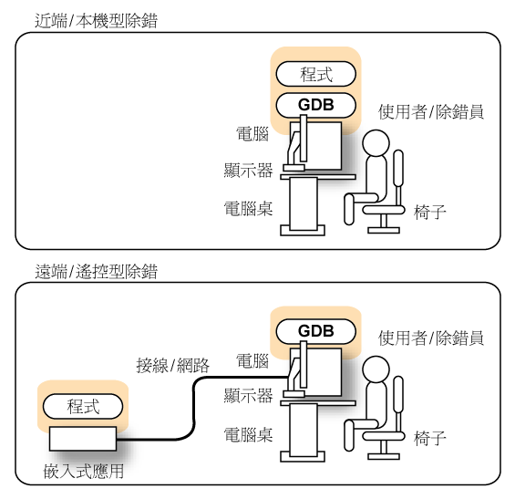 GDB具備遠端除錯能力的示意圖